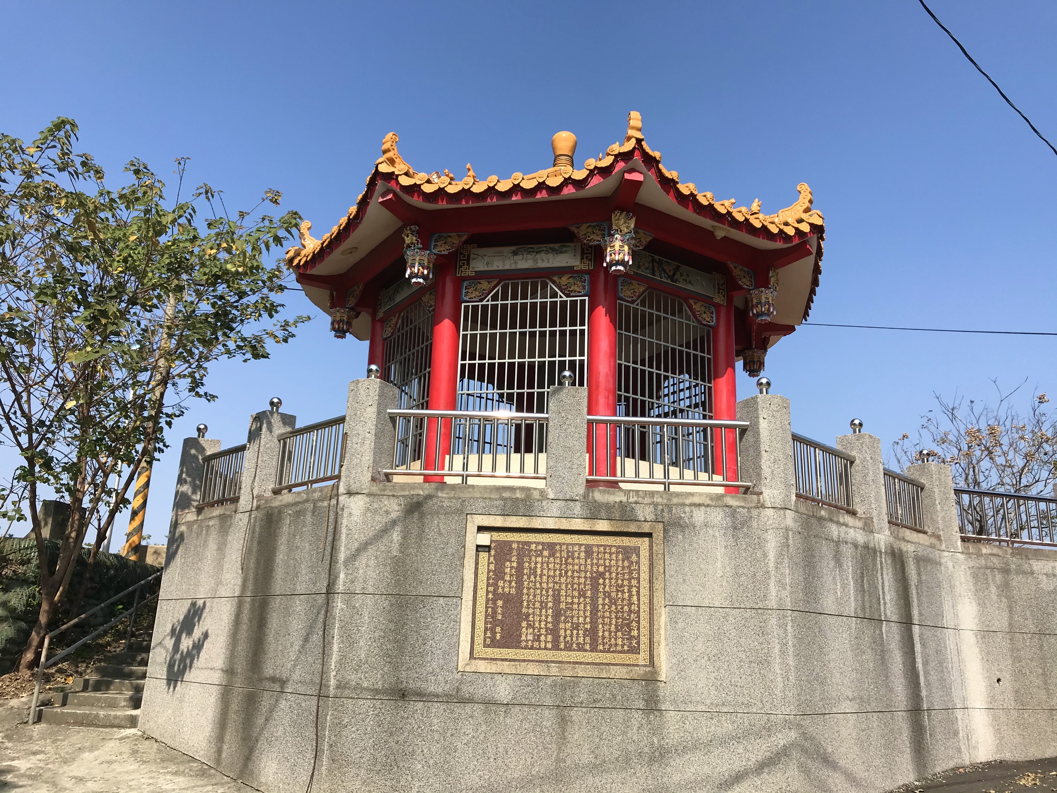 西螺泰山石敢當拱照亭